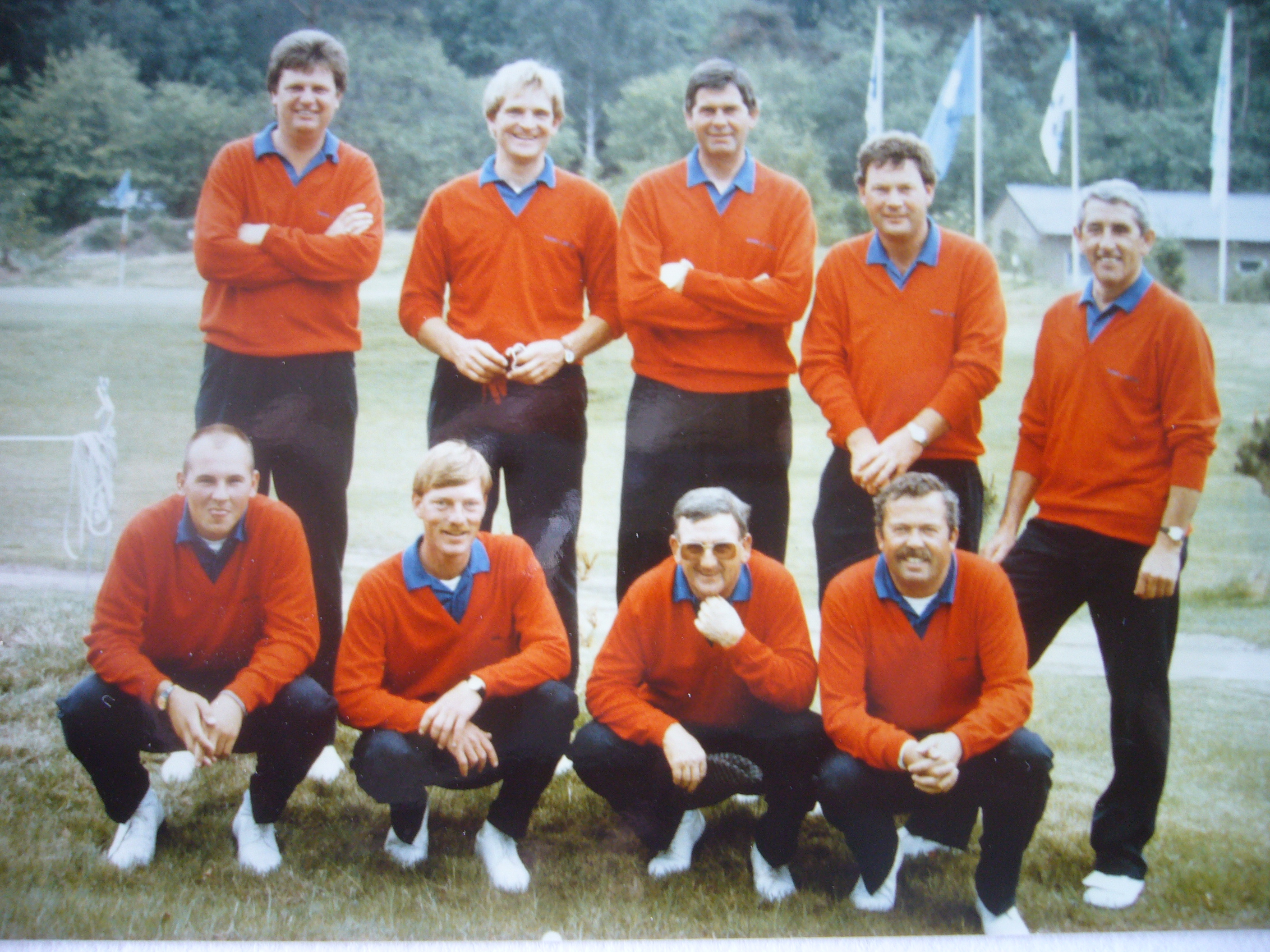 Nederlandse golfprofessionals 1990